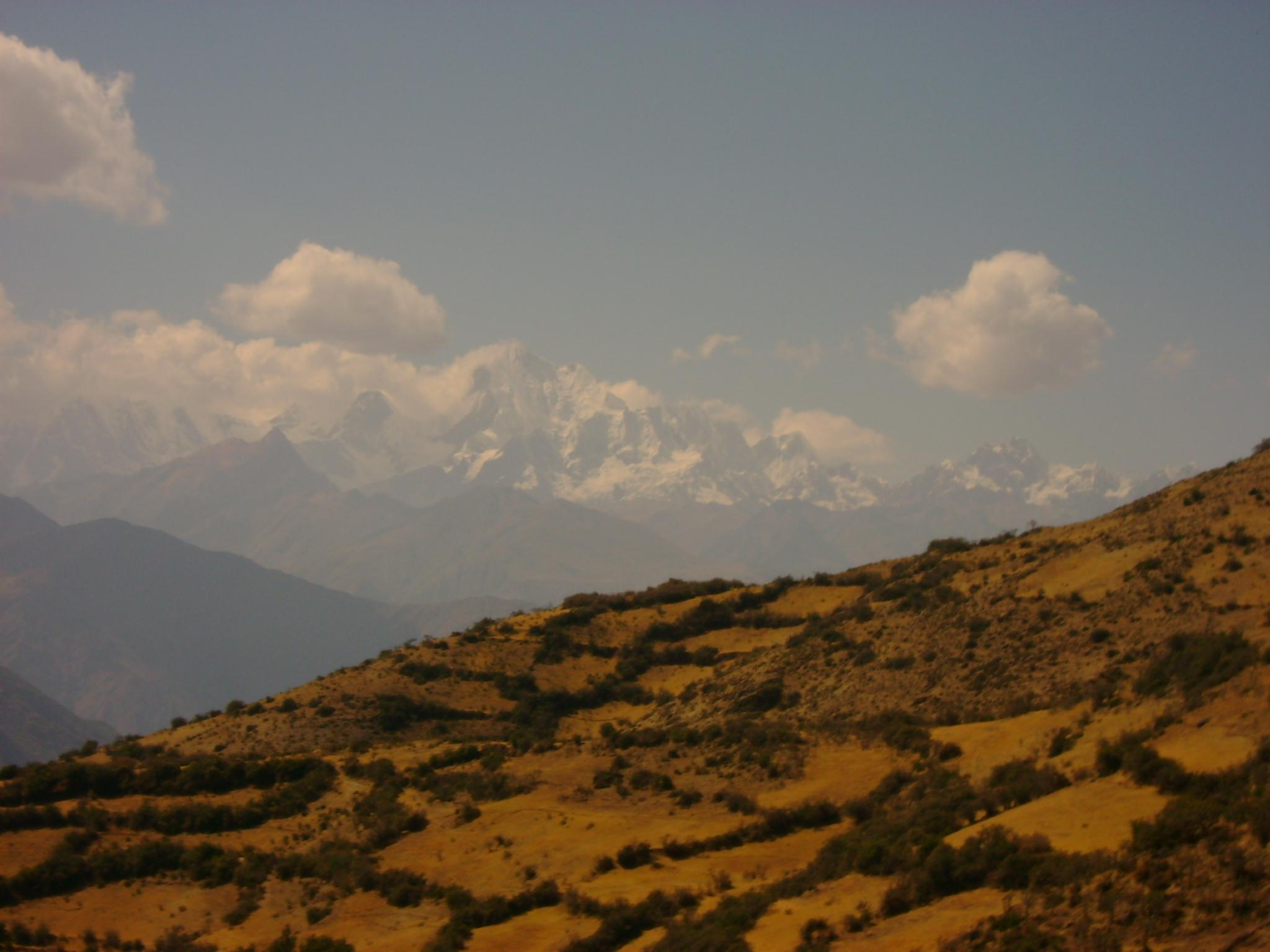 Yerupajá, desde la carretera.